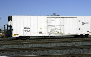 Box car refrigerado